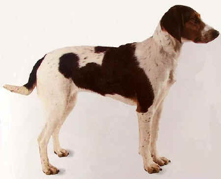 Haldenstovare